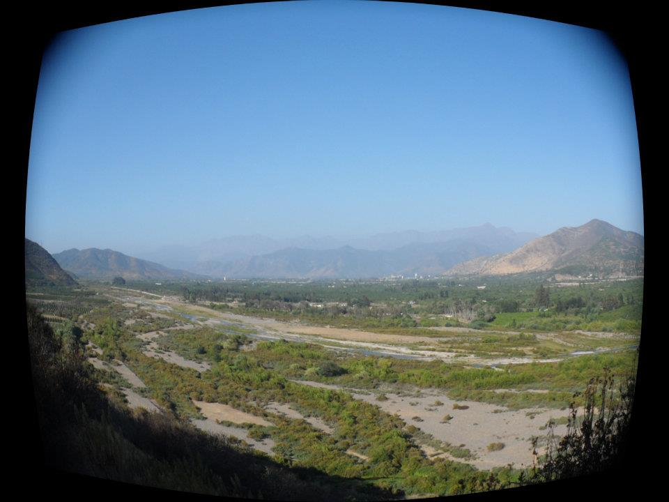 Tomada desde un cerro hacia el Valle de La Cruz